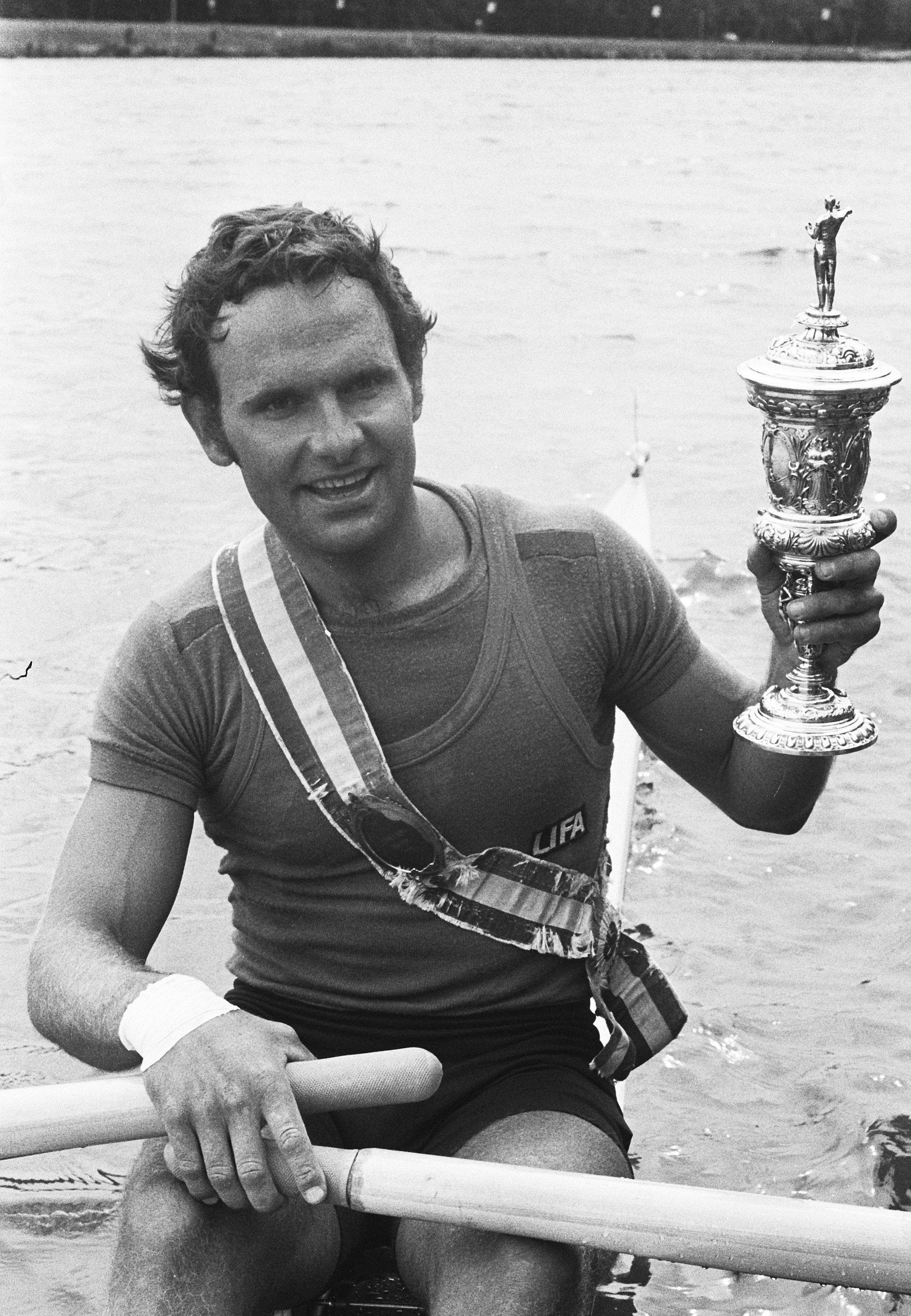 Koninkijke Hollandse Beker op Bosbaan Amsterdam; winnaar Alf Hansen (Noorwegen) met beker - Photo originally misidentified as Frank, whereas it seems to be his brother Alf